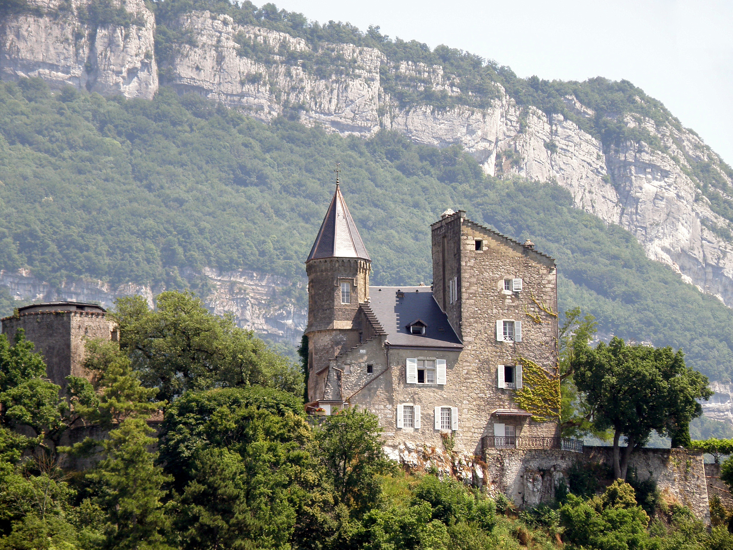 Chindrieux, comm. du département de la Savoie (région Rhône-Alpes, France). Le château de Châtillon, dans le village homonyme, au bord du lac du Bourget. À gauche, le donjon. À l’arrière-plan, la montagne de Cessens.